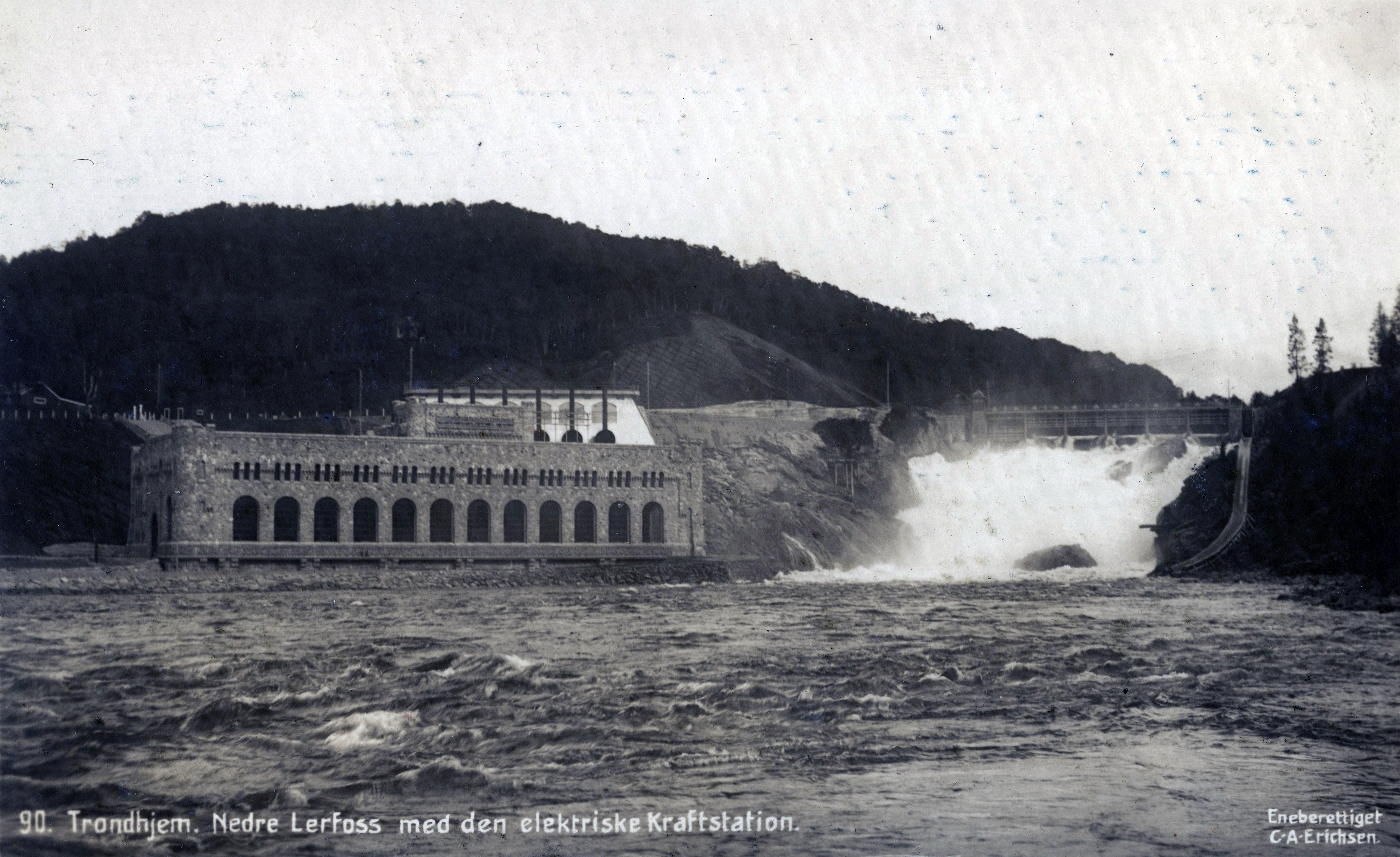 Format: Postkort. År: Tidlig 1900-tall, ca. 1910 - 1915. Om fotografen: ERICHSEN, C. A. - Drøbak og Bodø ca. 1910. Ett av hans bilder datert 1910 er med i Drøbakboken, og han har fotografert landskaper og brevkort i Bodø omtrent samtidig. Hentet fra Bonge, Susanne: Eldre norske fotografer. Fotografer og amatørfotografer i Norge frem til 1920 (Universitetsbiblioteket i Bergen)